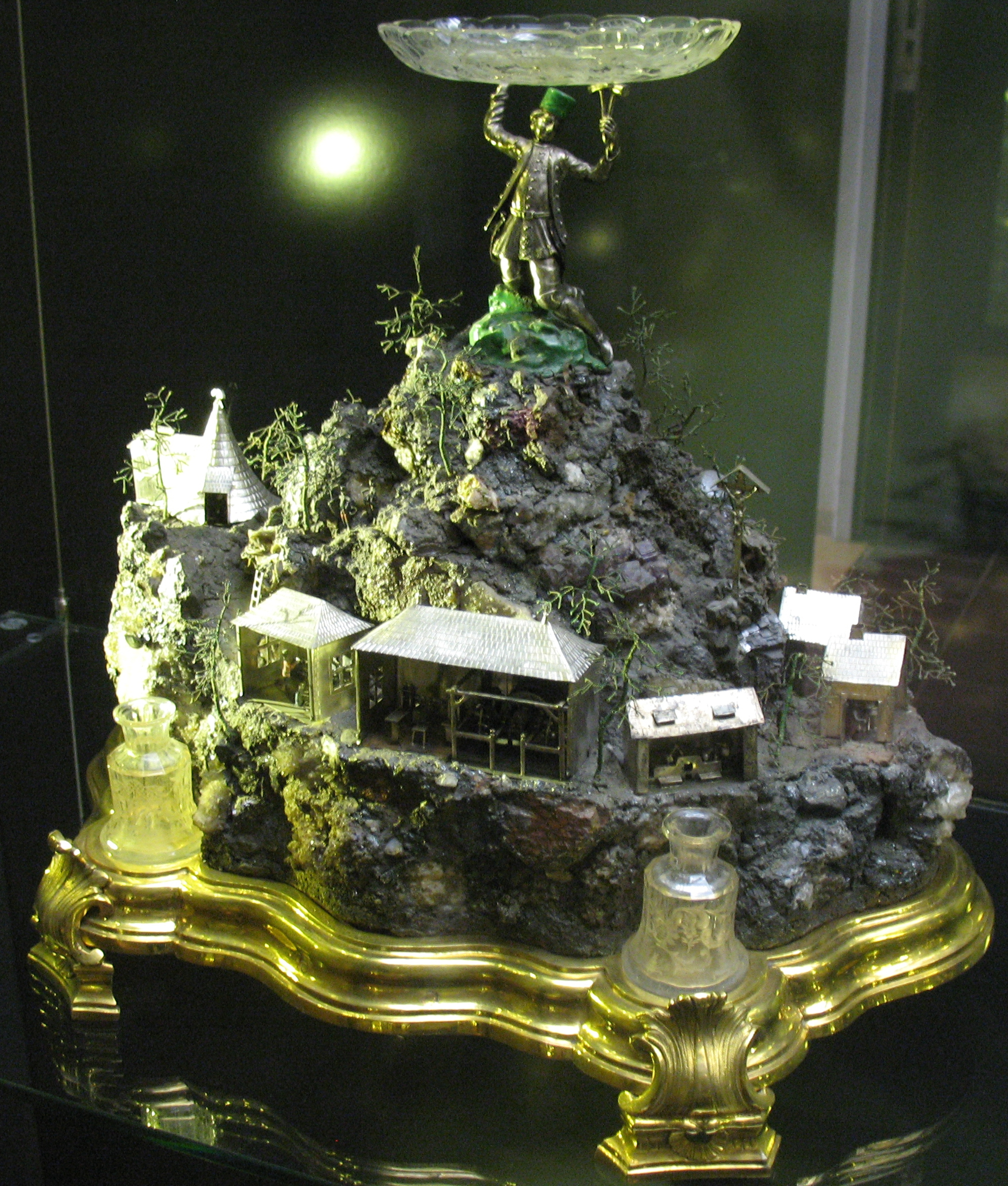 Handstein; Silber, z.T. vergoldet, Mineralien; wohl Neusohl/Banská Bystrica (Slowakei) um 1740; ausgestellt im Deutschen Bergbaumuseum Bochum (Inventar-Nr. 030001671001)